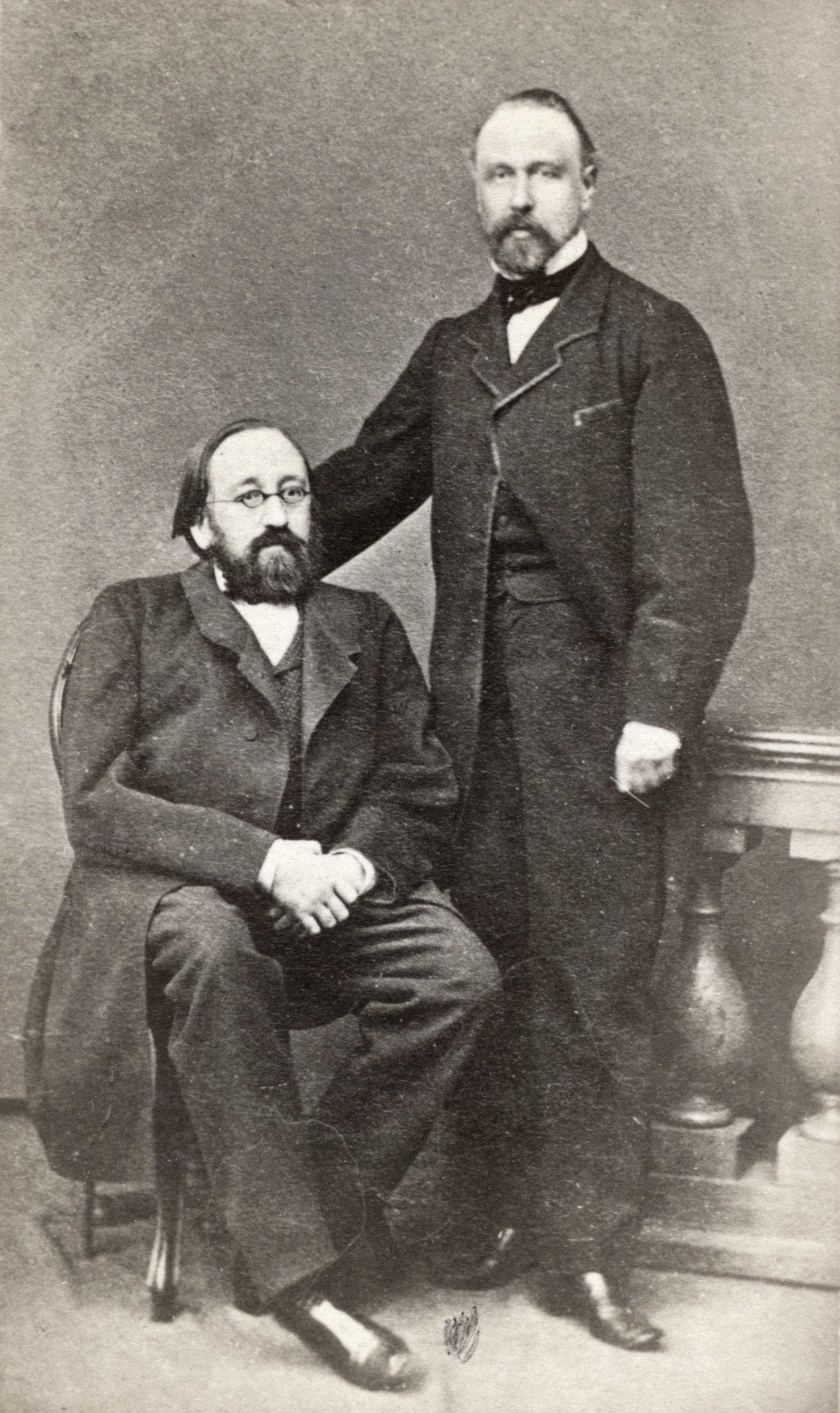 Павел Михайлович Леонтьев и Михаил Никифорович Катков